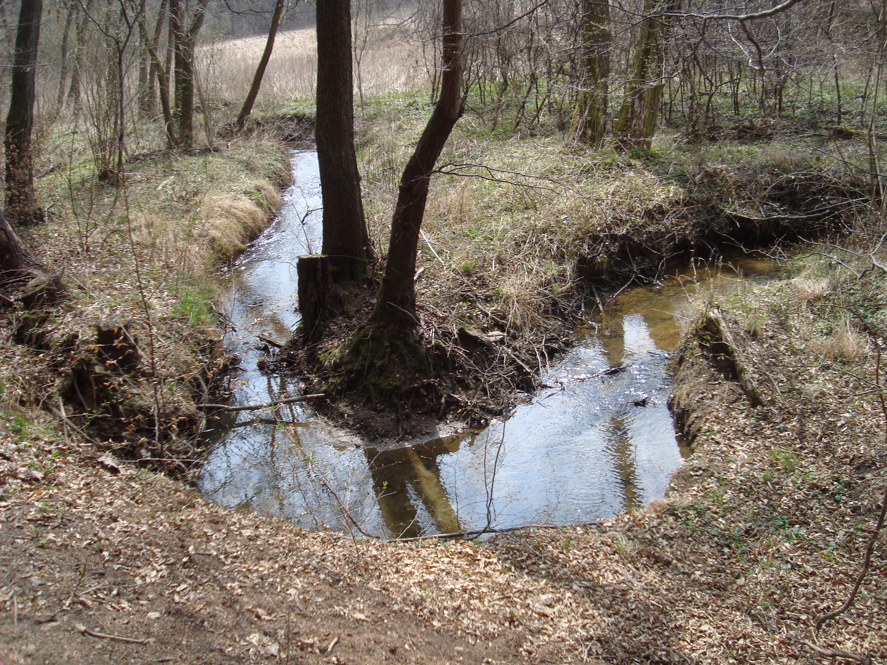 Bílá voda v Maríánském údolí